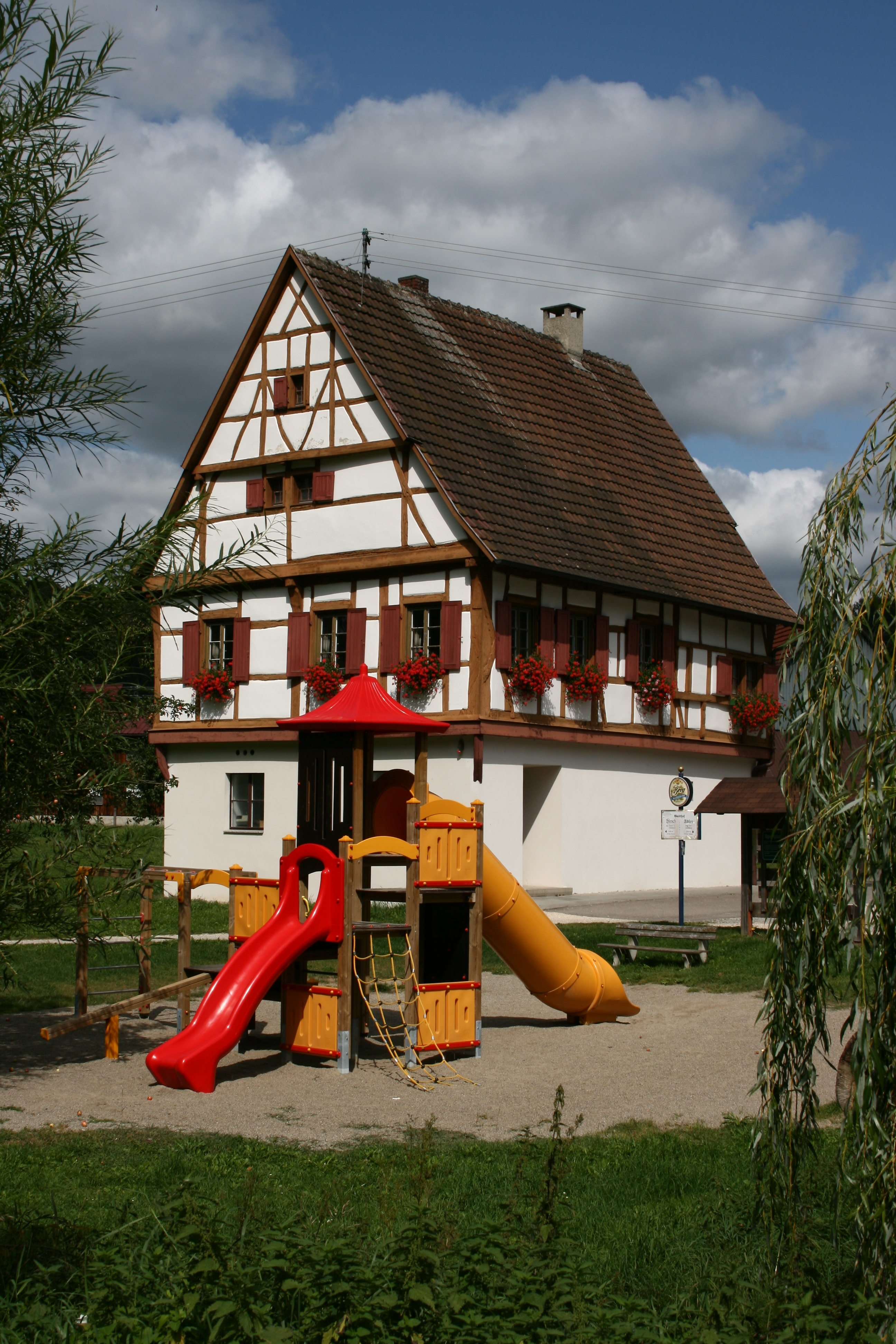 Rathaus in Hayingen-Indelhausen im Landkreis Reutlingen